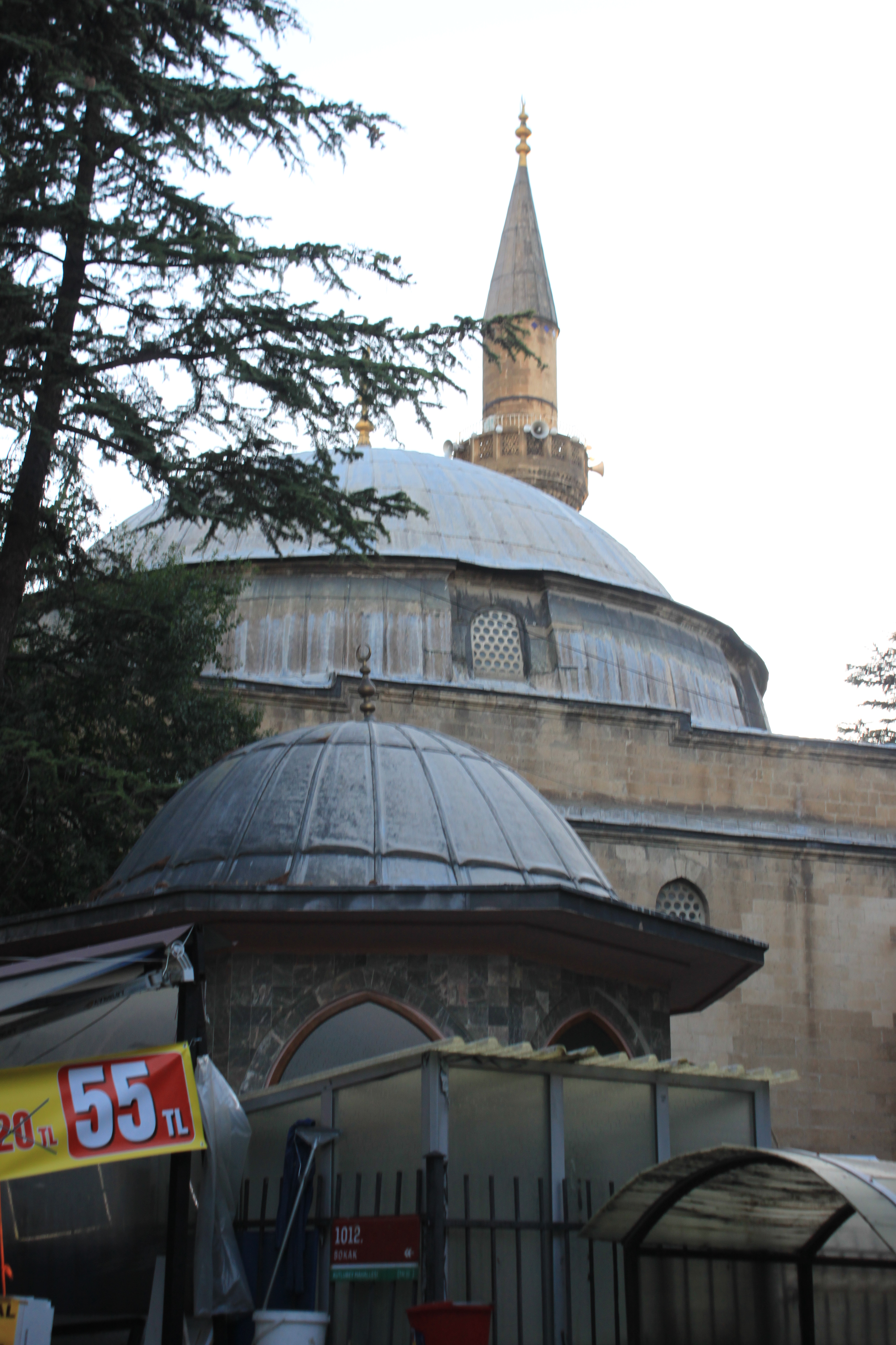 Isparta; die Firdevs Paşa Camii, auch: Mimir Sinan Camii genannt, von 1561 im Zentrum von Isparta.